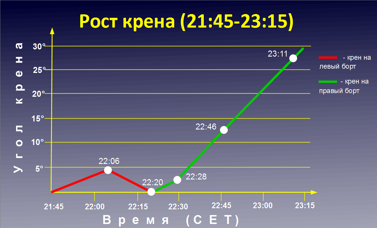 Рост крена «Коста Конкордии» в течение полутора часов после столкновения с рифом